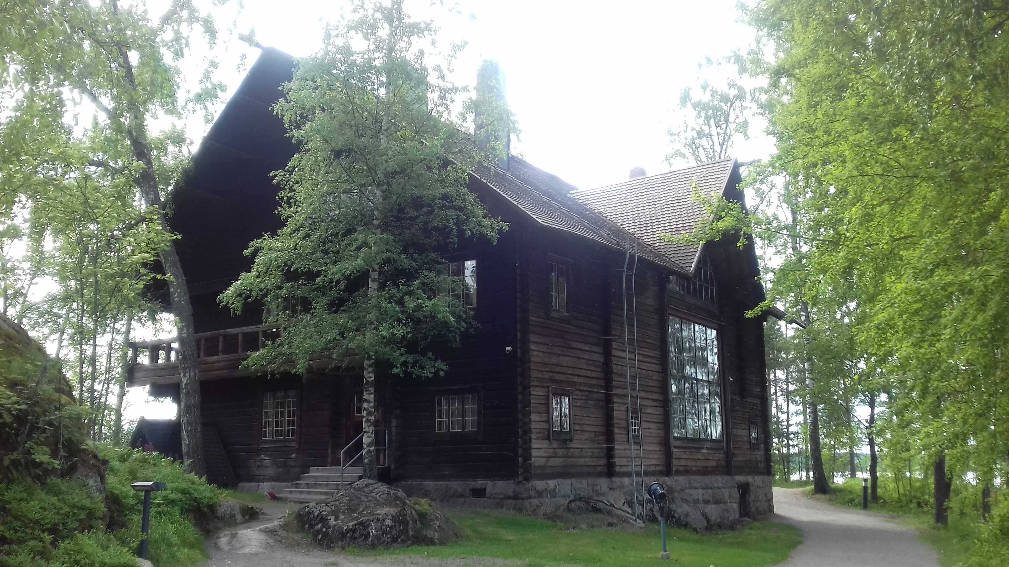 Halosenniemi; Pekka Halosen kotimuseo This is a photo of a monument in Finland identified by the ID 'Halosenniemi' (Q6351302) This is a photo of a monument in Finland identified by the ID 'Tuusula coastal road' (Q30689434) - RKY: 1477